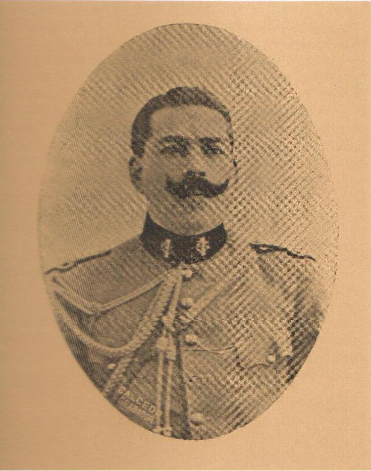 Gral. Enrique García Robles